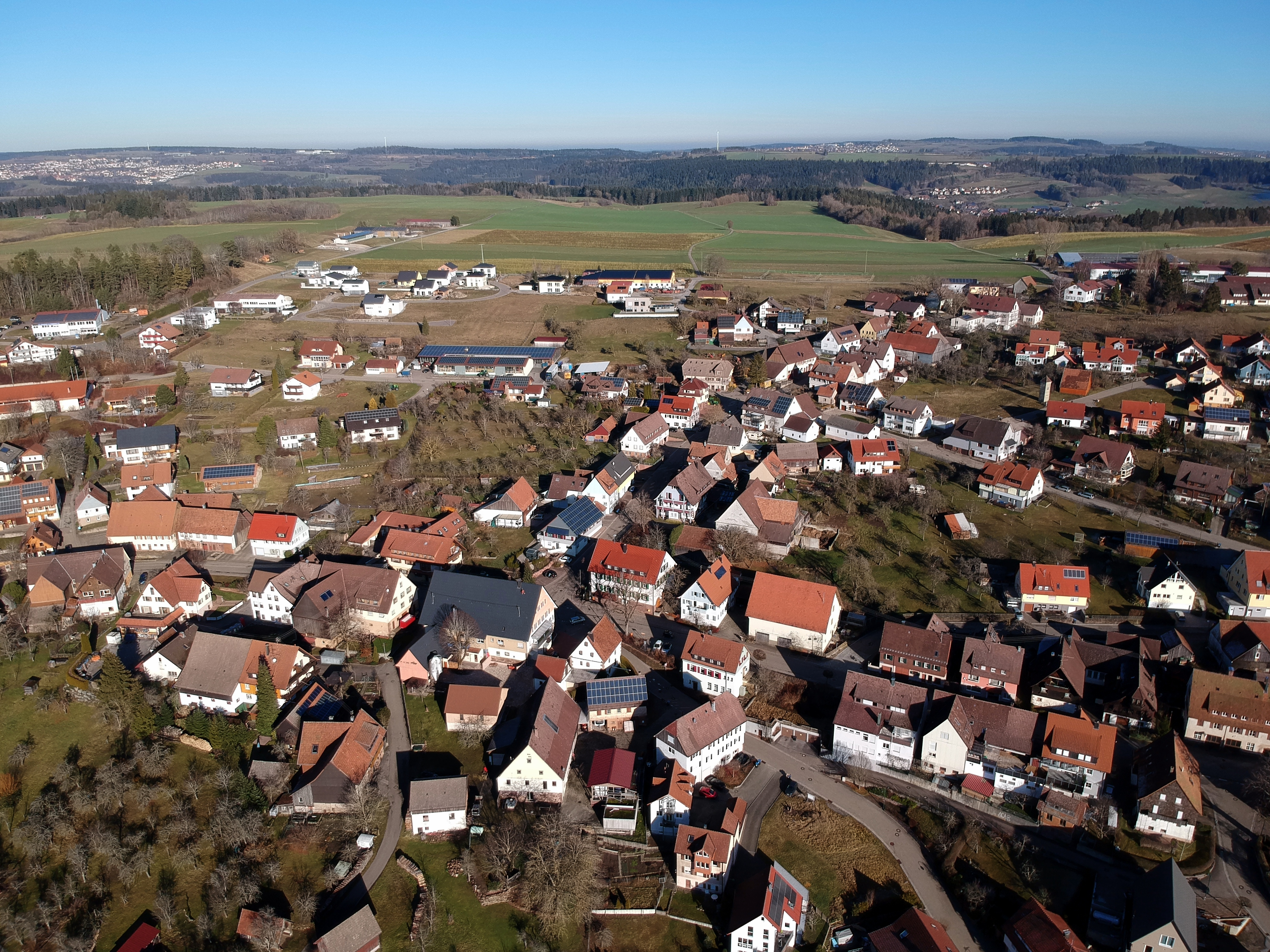 Ortsmitte von Wittendorf (Loßburg) - mit dem grauen Dach Gasthaus Löwen, Hauptstraße gerade von Mitte links nach rechts unten